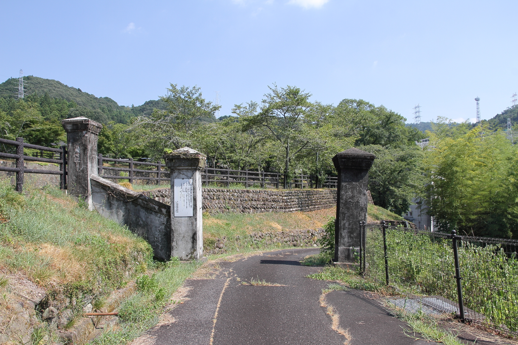 旧八百津発電所資料館出入口